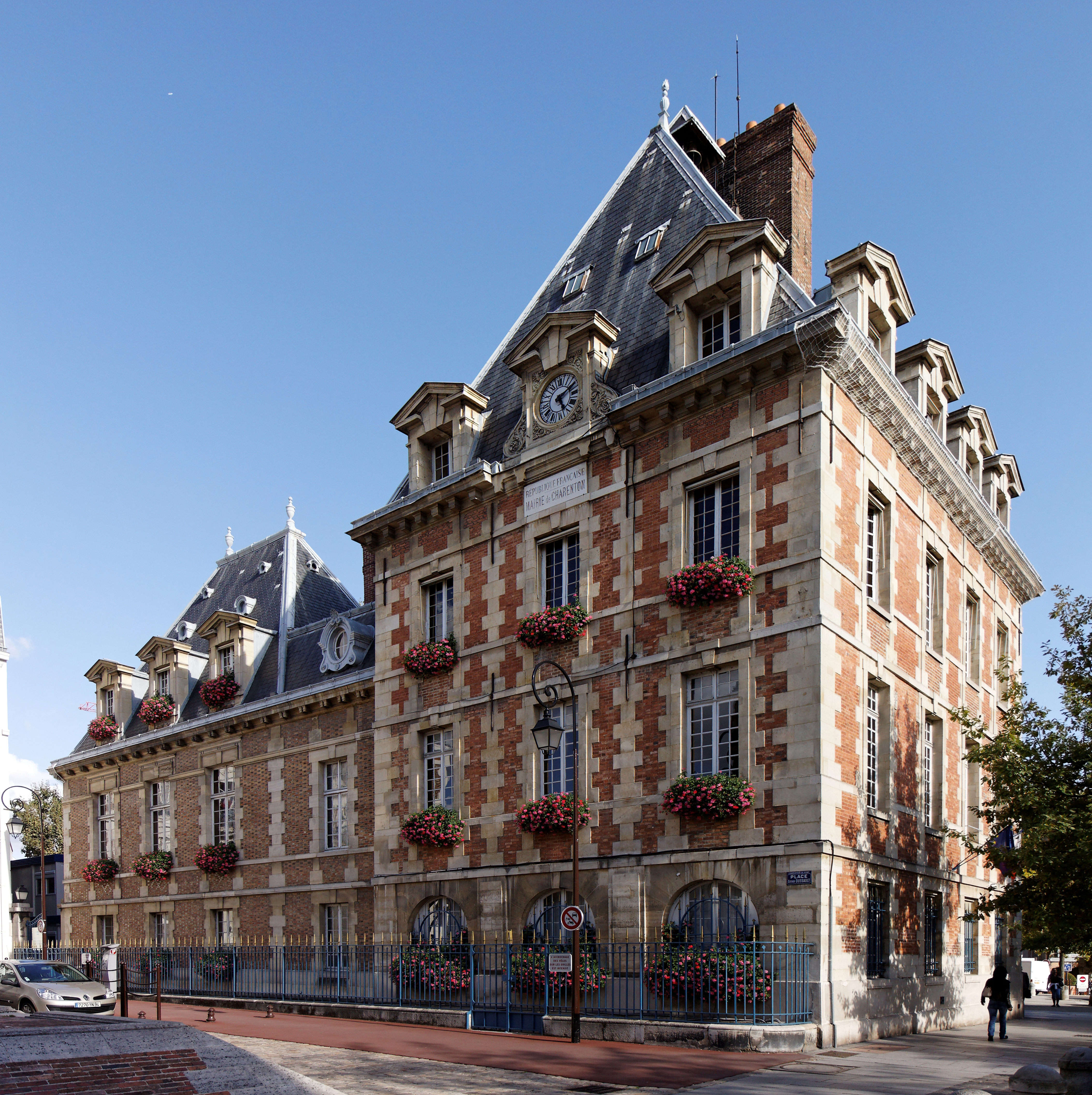 La mairie. .